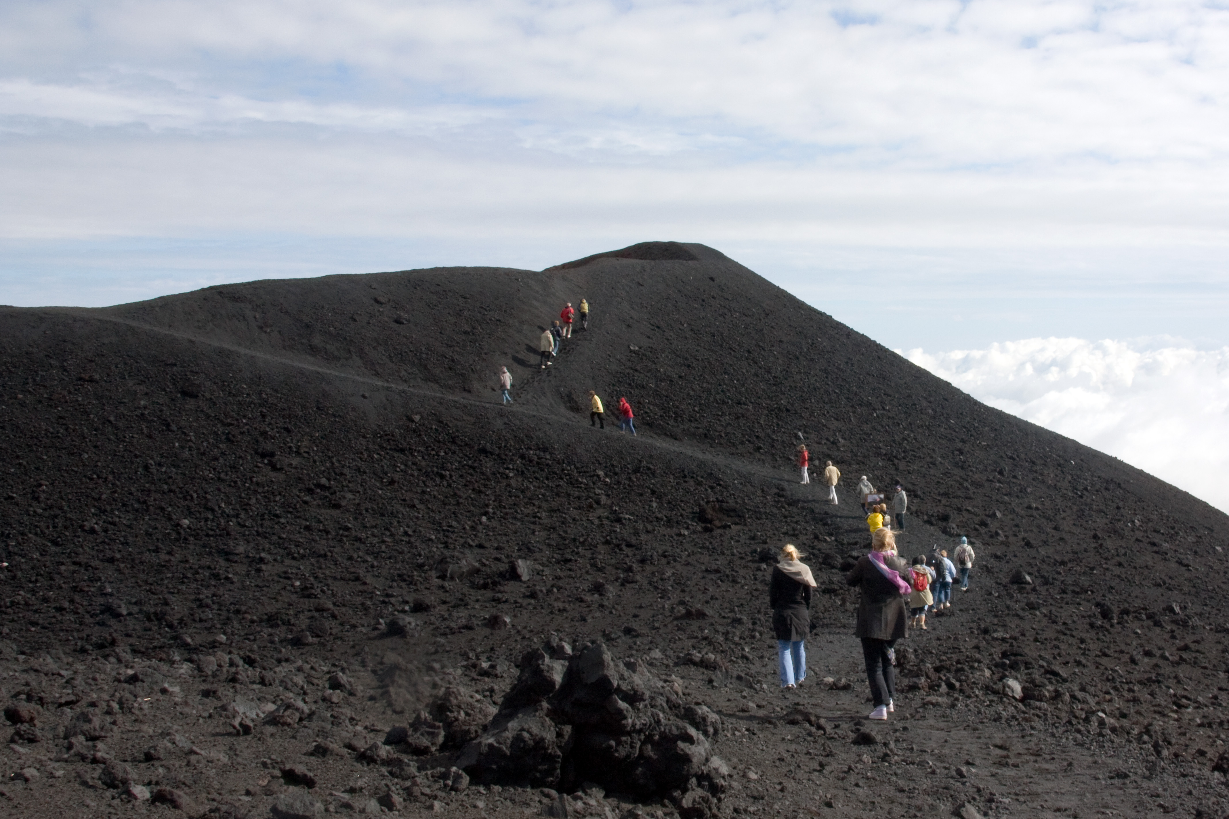 Volcan Etna - Sicile, Italie Une excursion sur les bords d'un des cratères récents